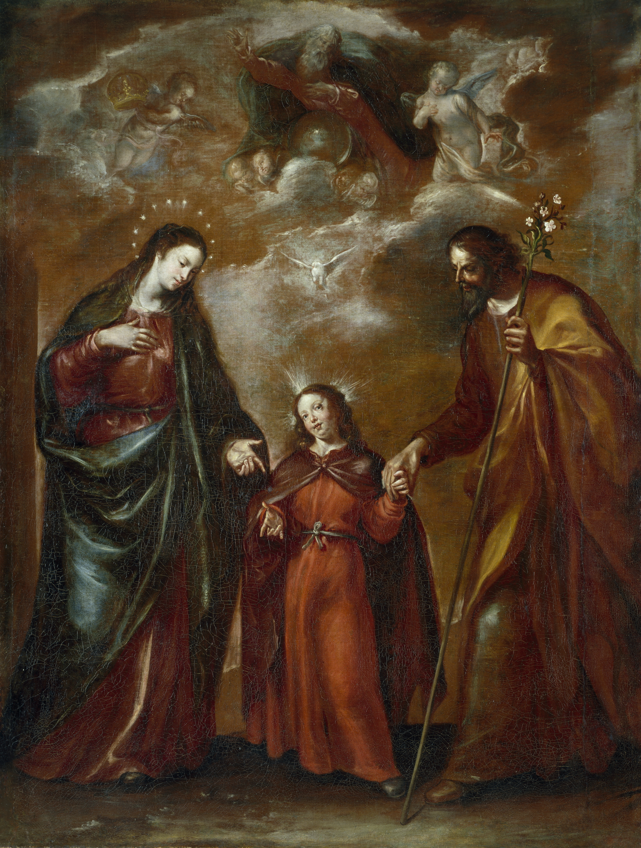 La obra representa a los tres miembros de la Sagrada Familia cristiana.